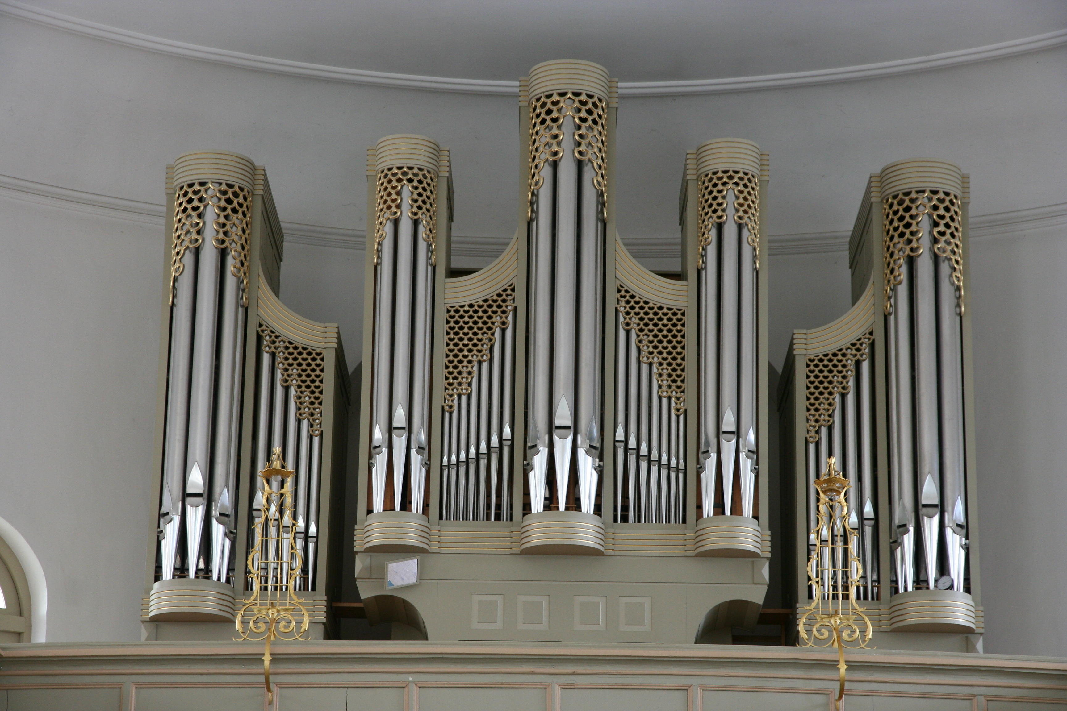 Evangelische Stadtkirche Bad Wildbad